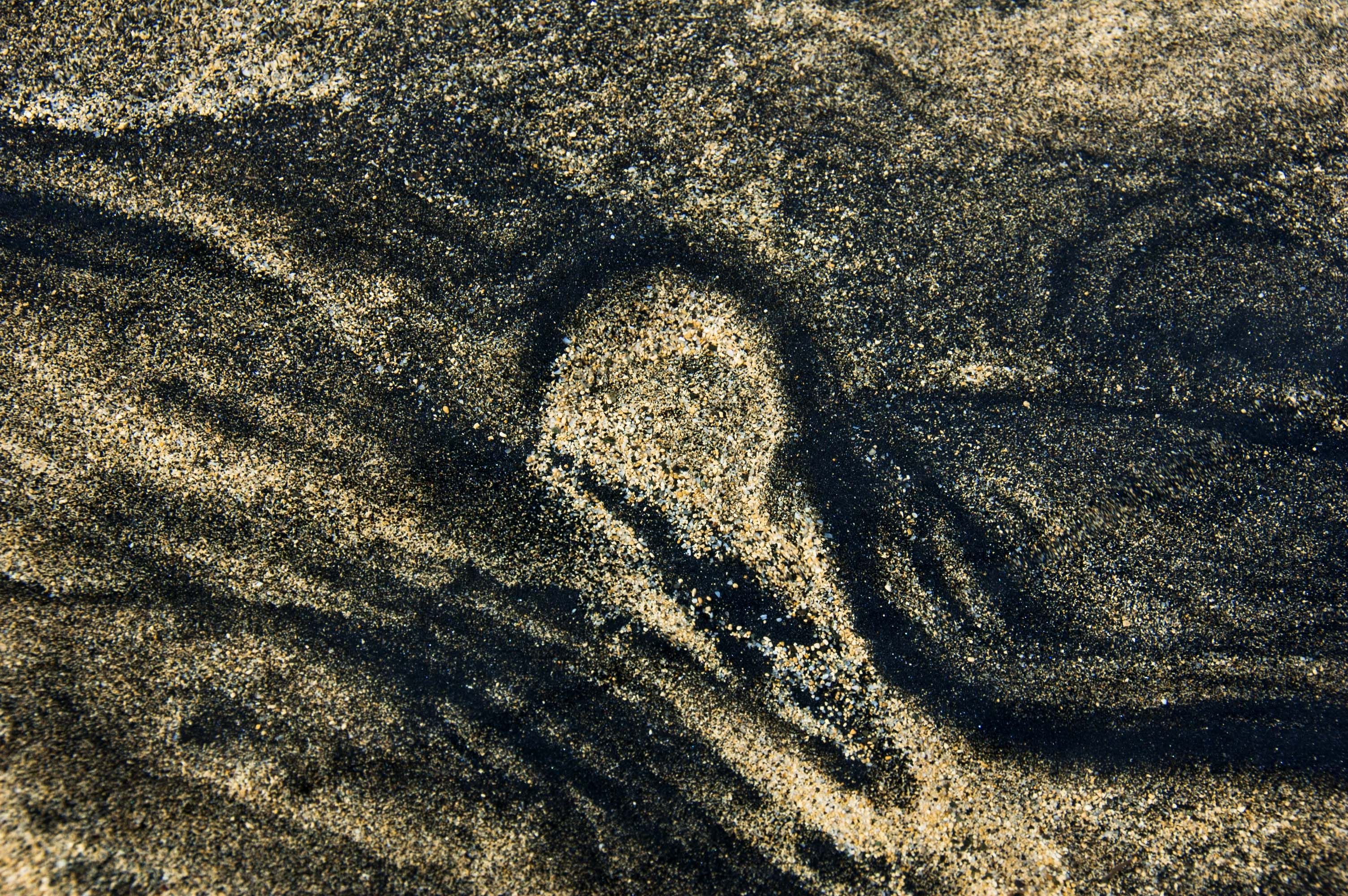 Sand bilde til beskrivelse av Morten Leine sine arbeider